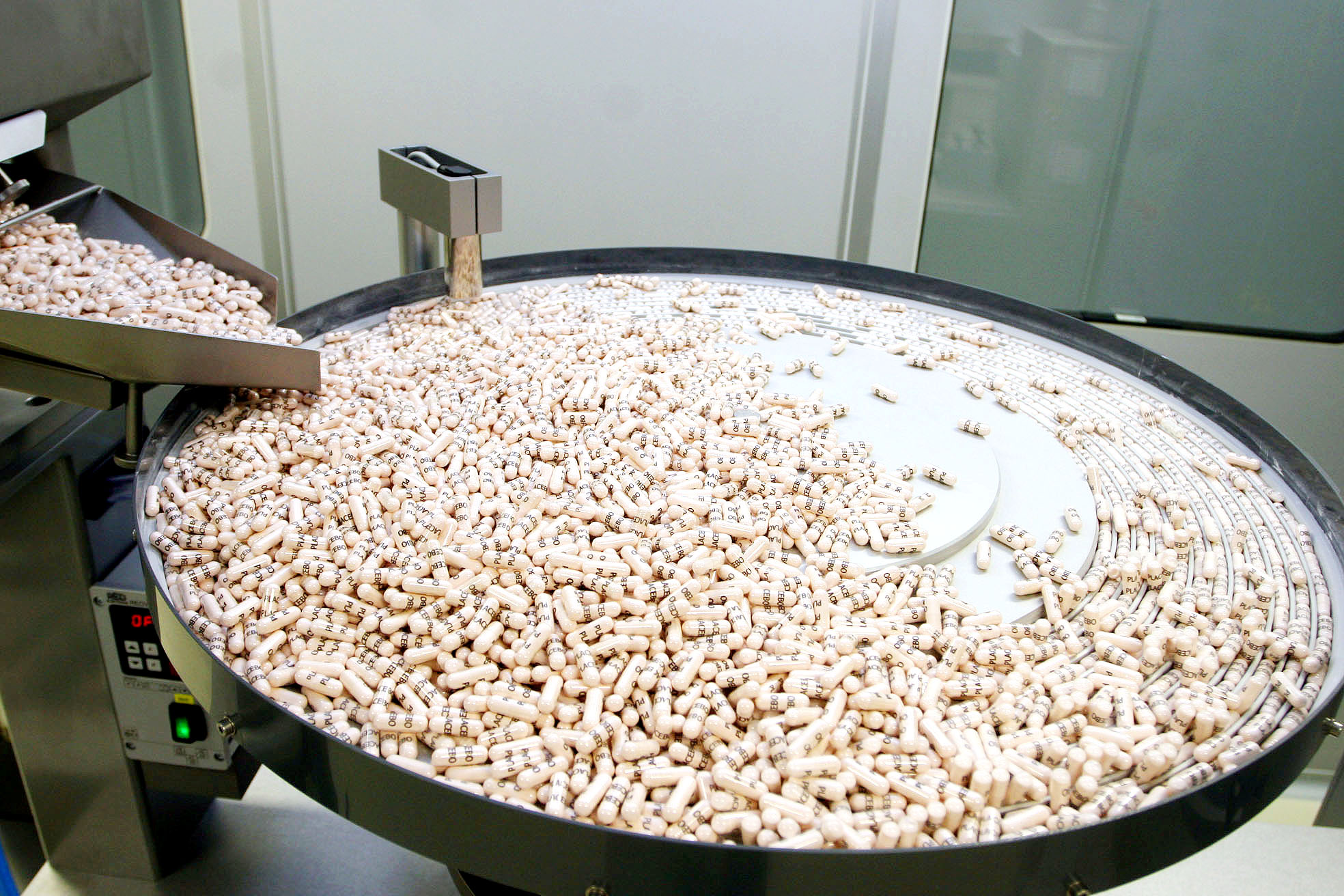 Medicamentos